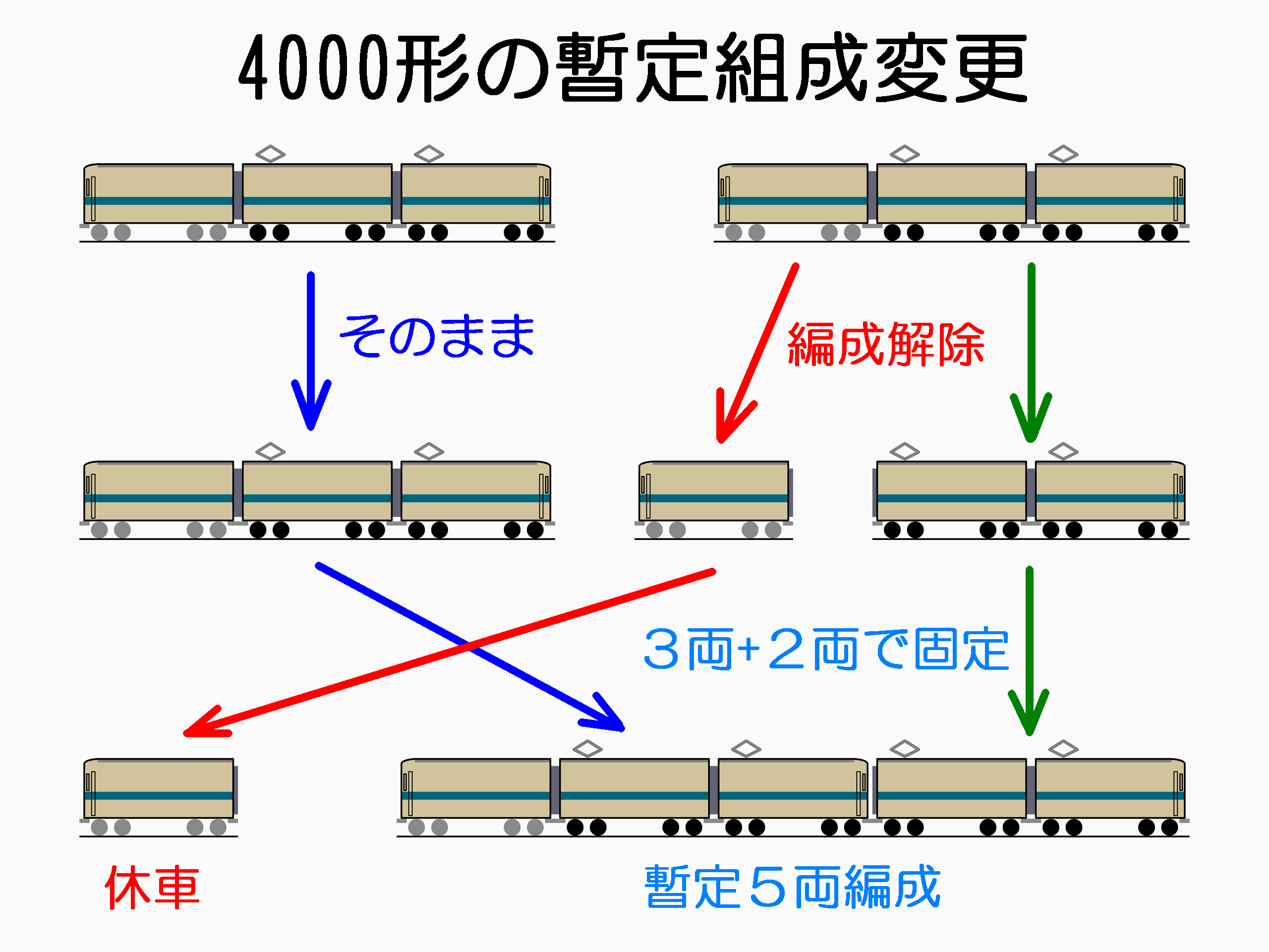 小田急電鉄4000形(釣り掛け車時代)の組成変更を示した図